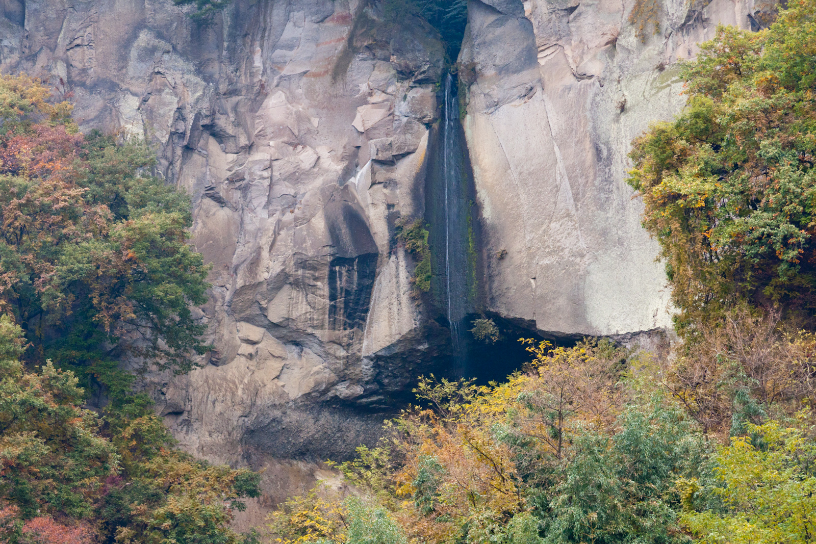 棚下不動雌滝